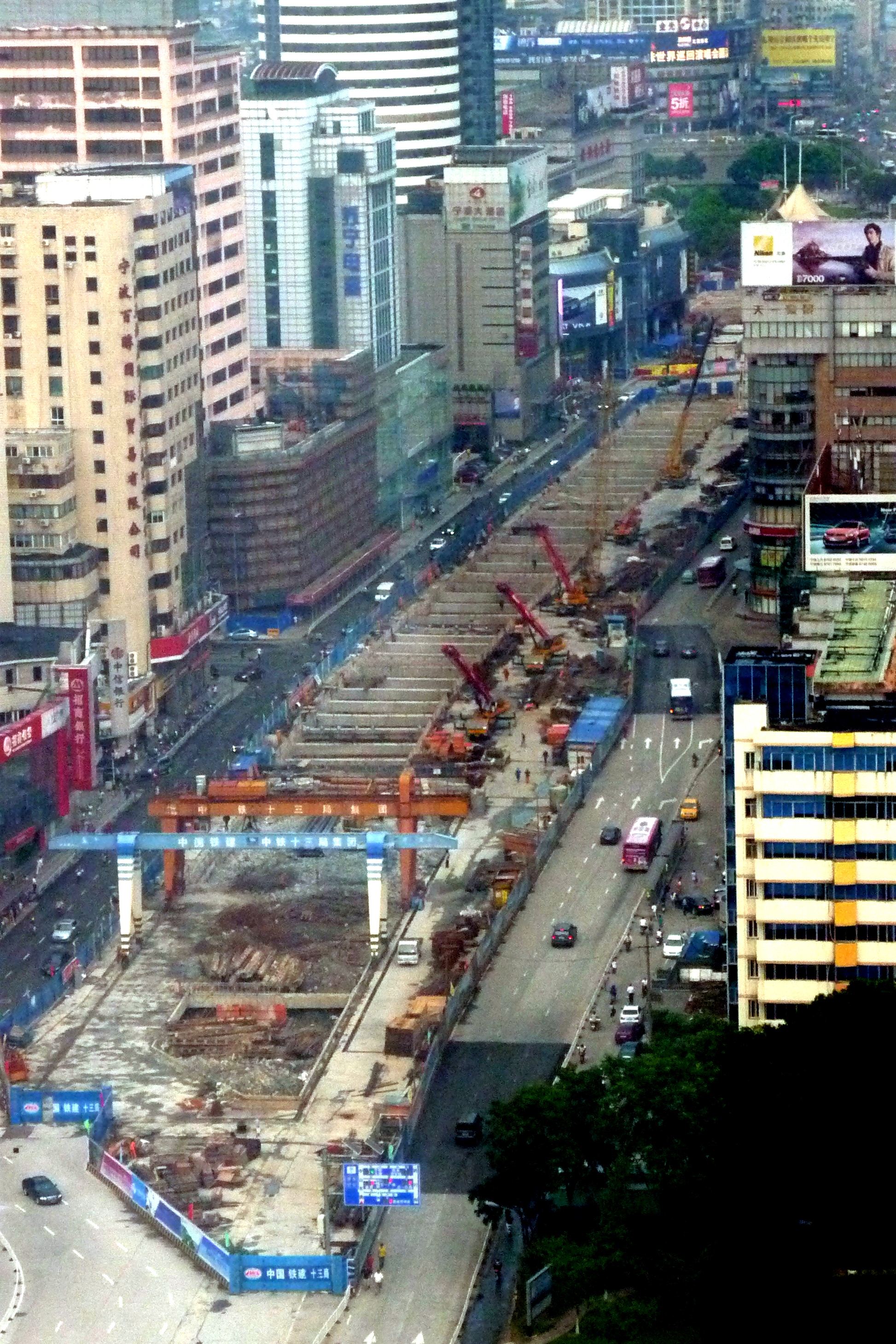 鼓楼-东门口区间明挖